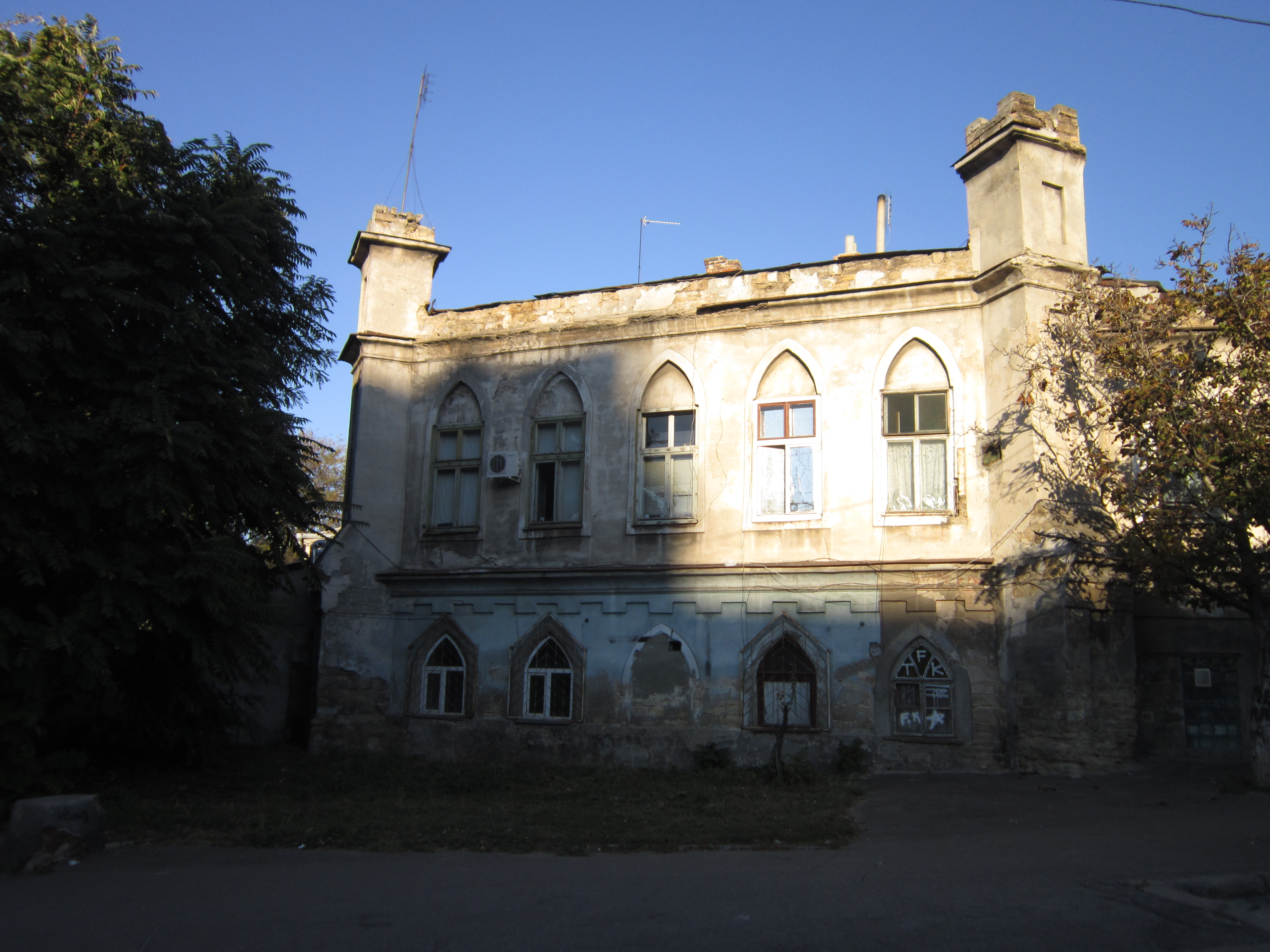 Будинок Бражинського, Одеса, Пастера вул., 1